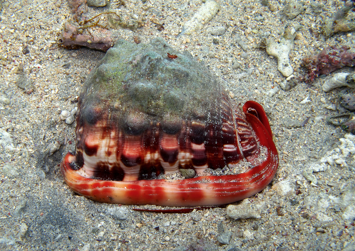 Le gastéropode Cypraecassis rufa à la Réunion.